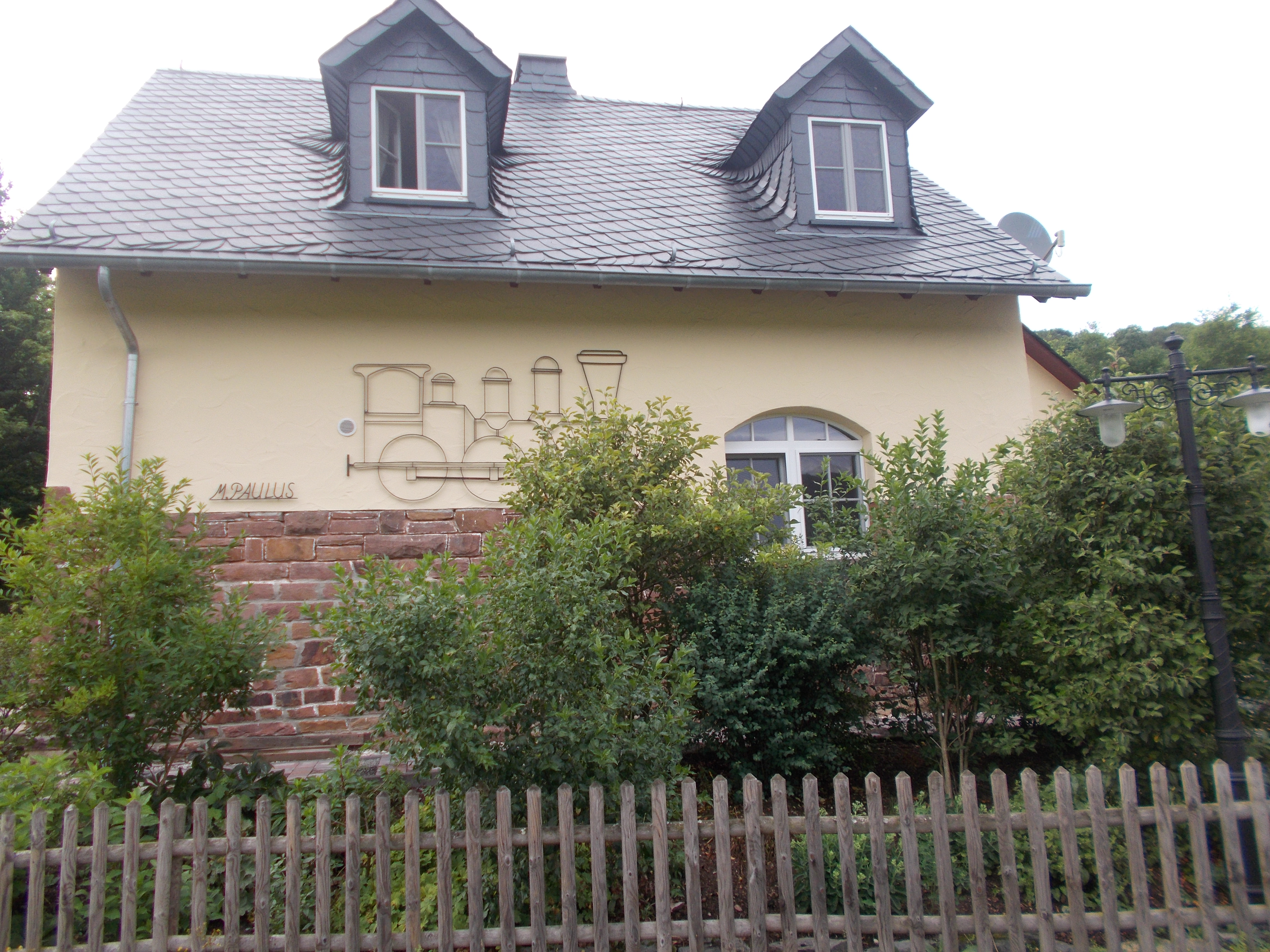 ehemaliger Bahnhof; Empfangsgebäude mit Fachwerkgüterschuppen, Typenbau, zwei kleine, ähnlich gestaltete Nebengebäude, Anfang des 20. Jahrhunderts